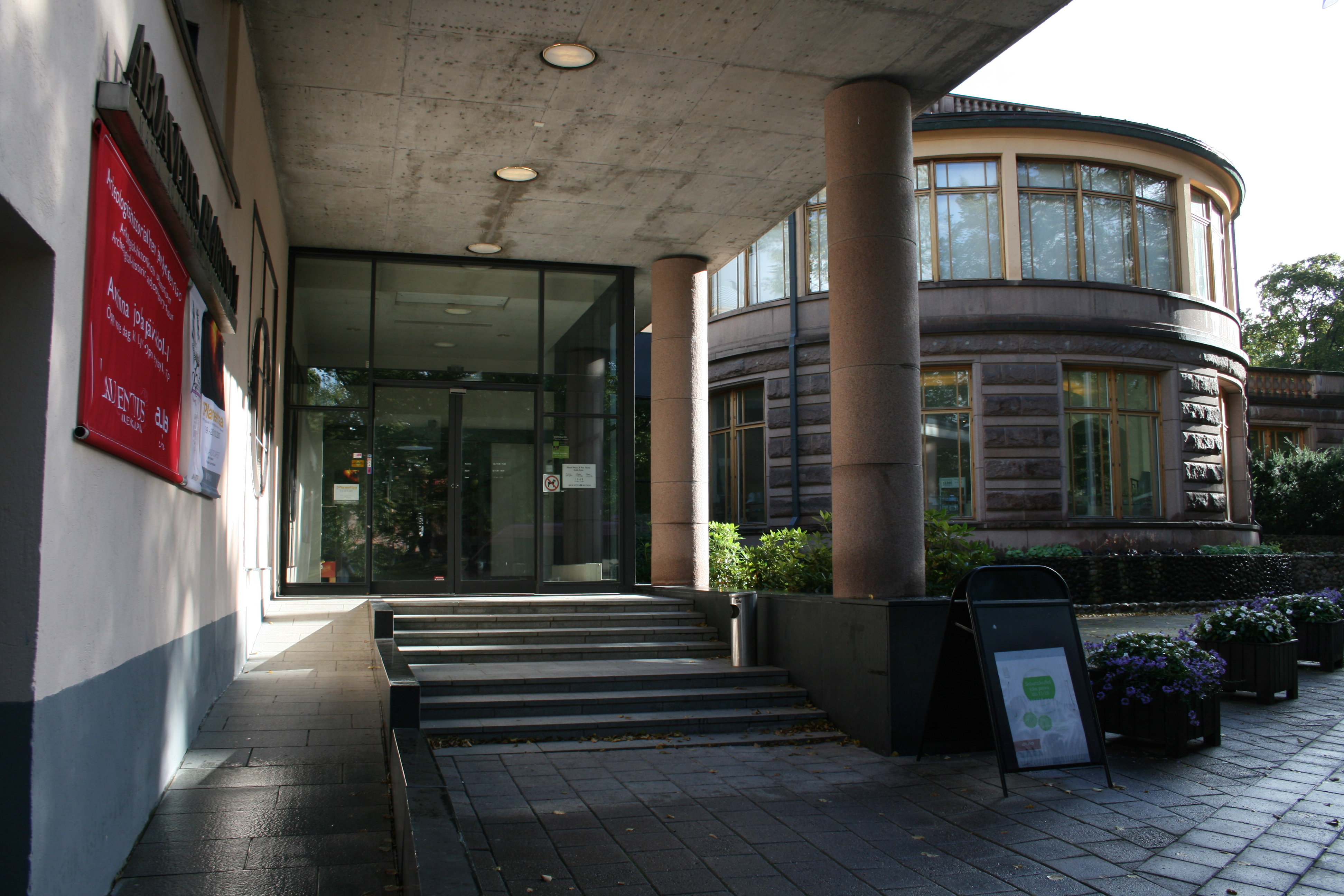 Aboa Vetus Ars Nova. Turun historiaa ja nykytaidetta esittelevä museoAboa Vetus Ars Nova